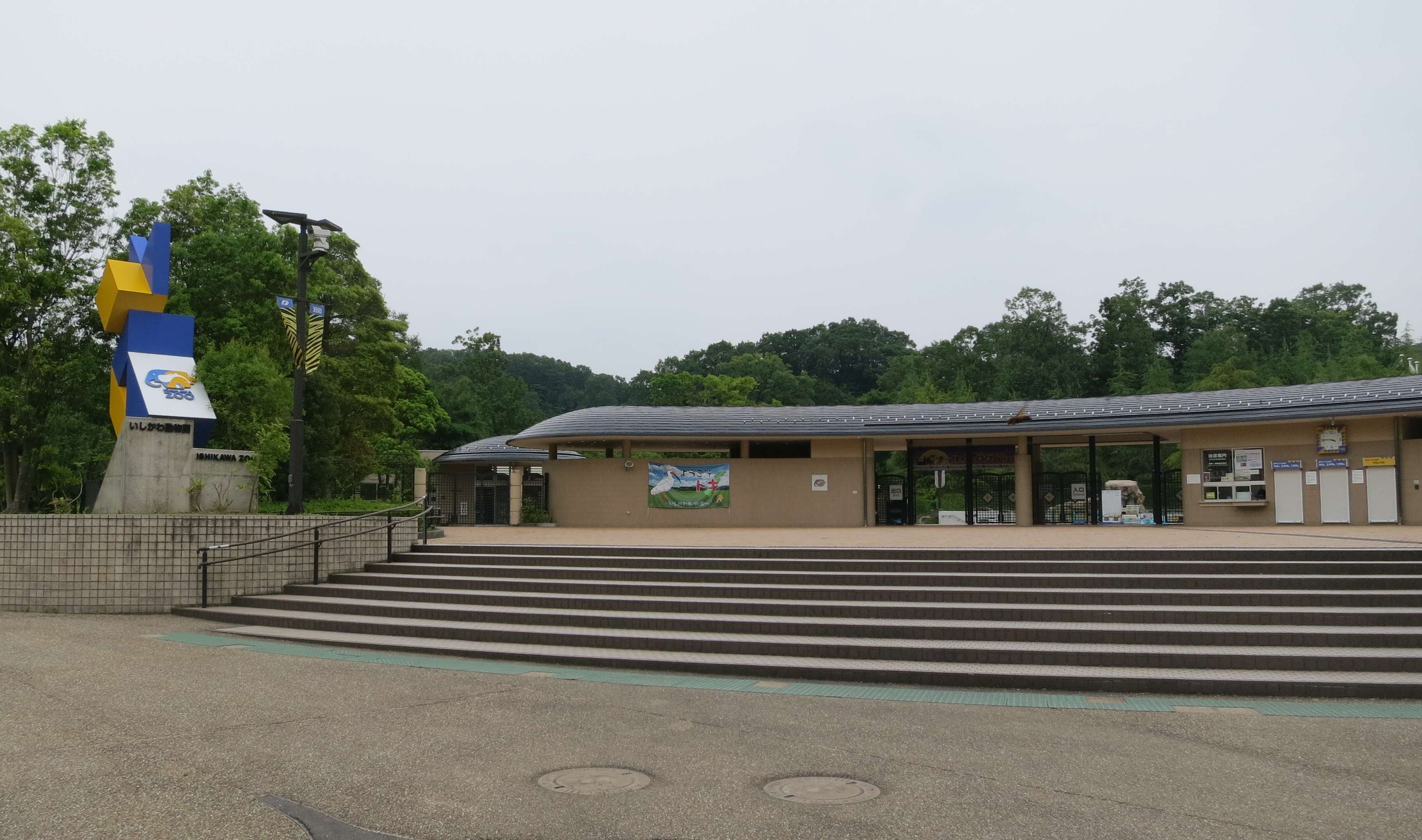 いしかわ動物園外観（入場口）